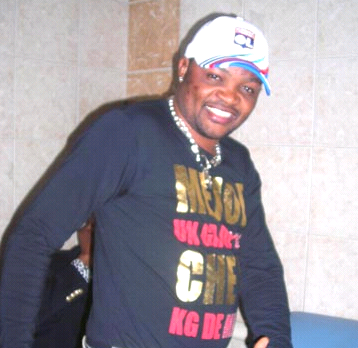 source : photo personnelle Description : Mareshal Dj à Lyon